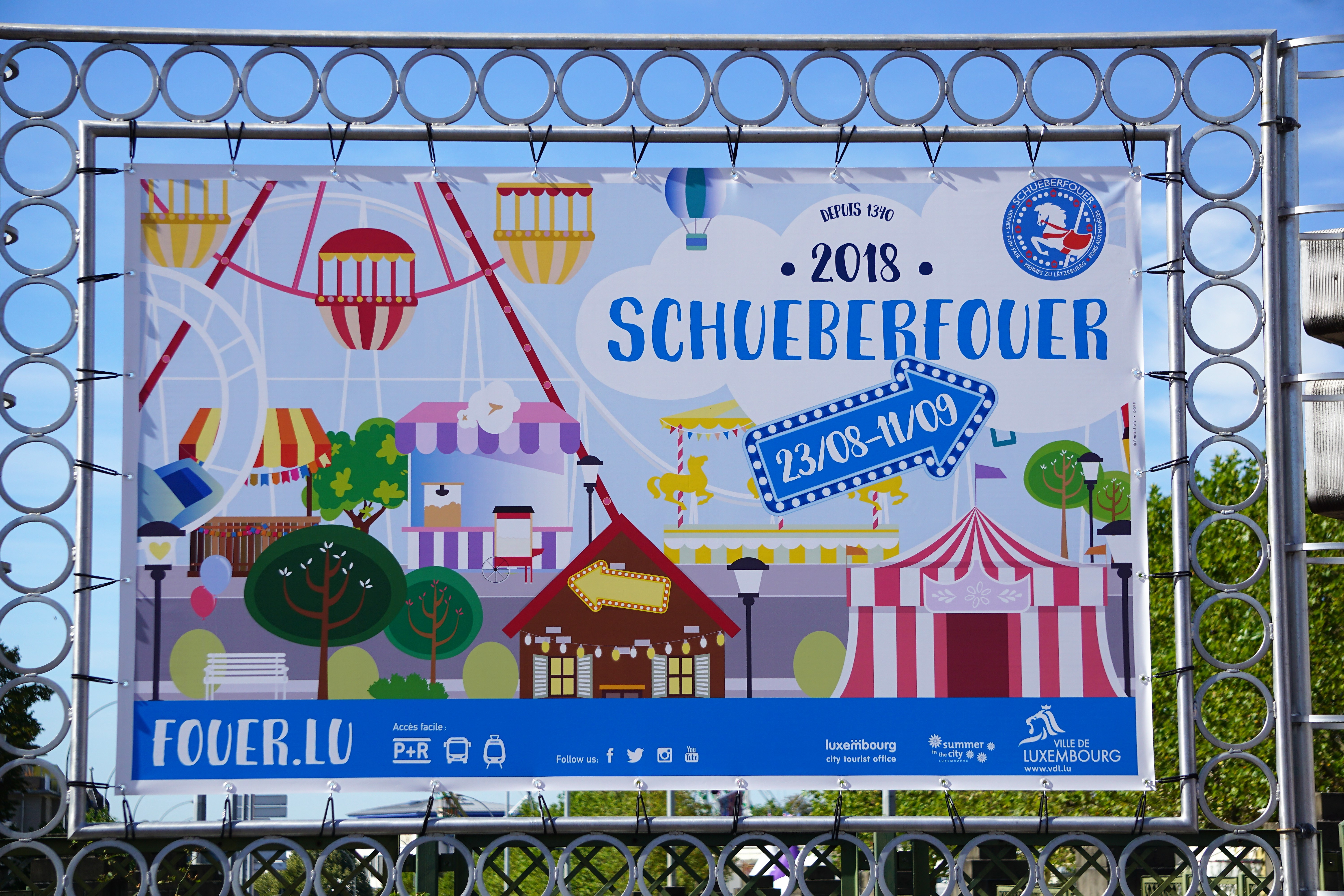 Luxembourg, fête foraine Schueberfouer 2018. Affiche publicitaire.